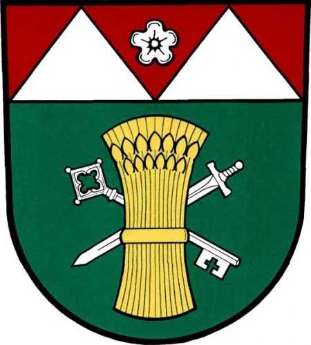 znak, Kojatice, okres Třebíč